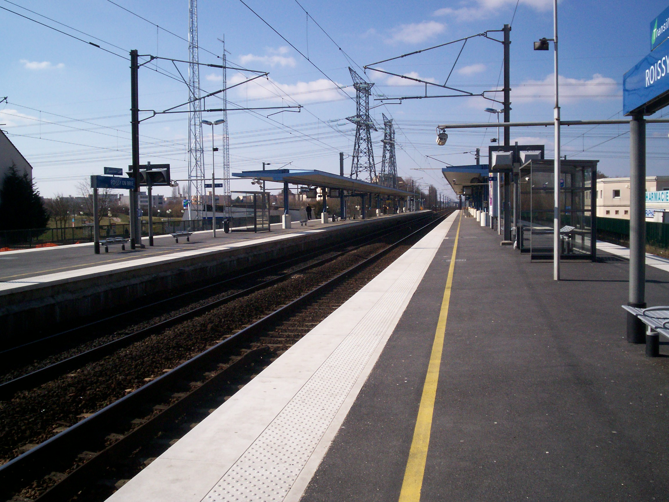 RER E - Gare de Roissy-en-Brie